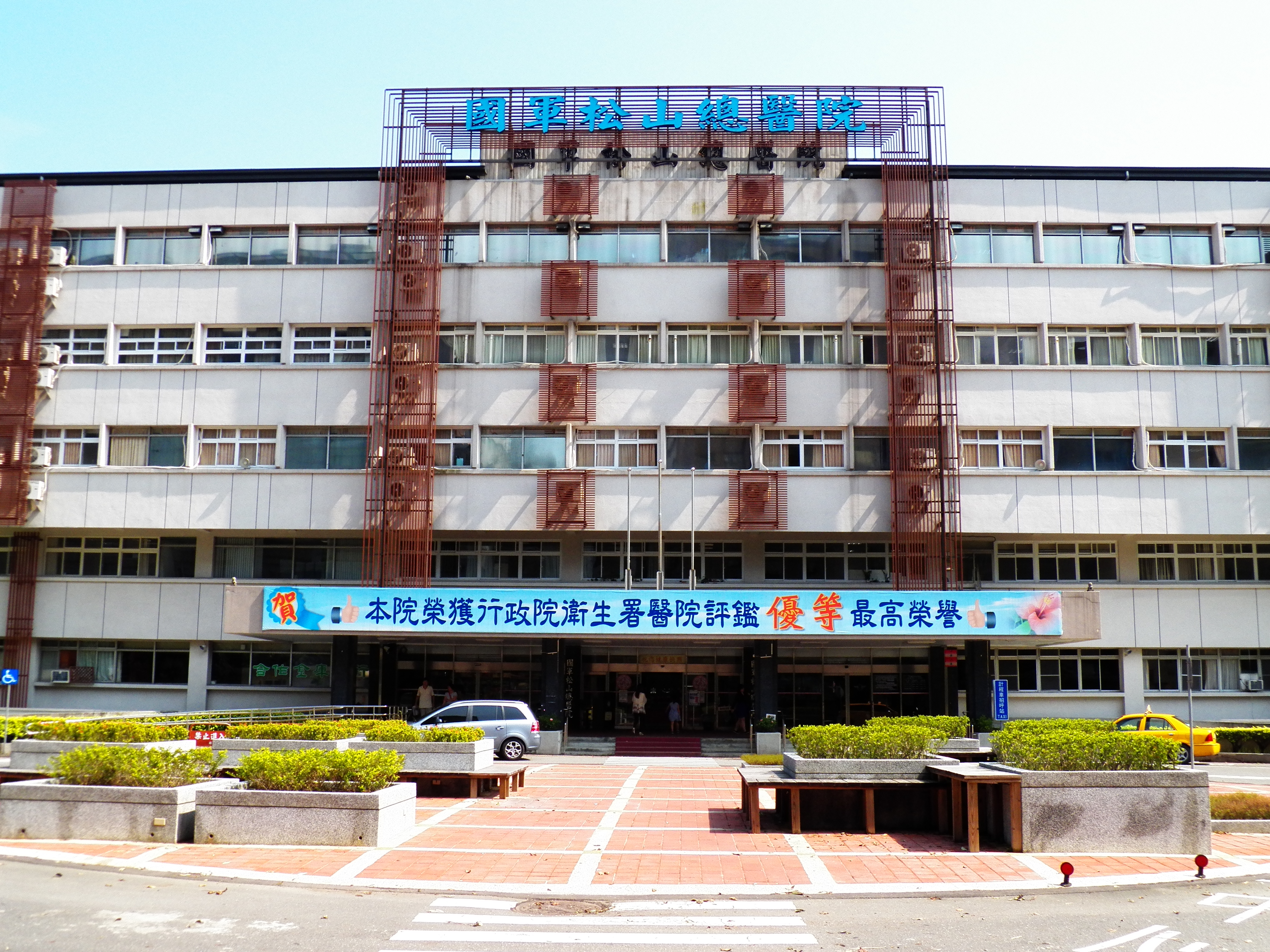 國軍松山總醫院醫療大樓入口前。